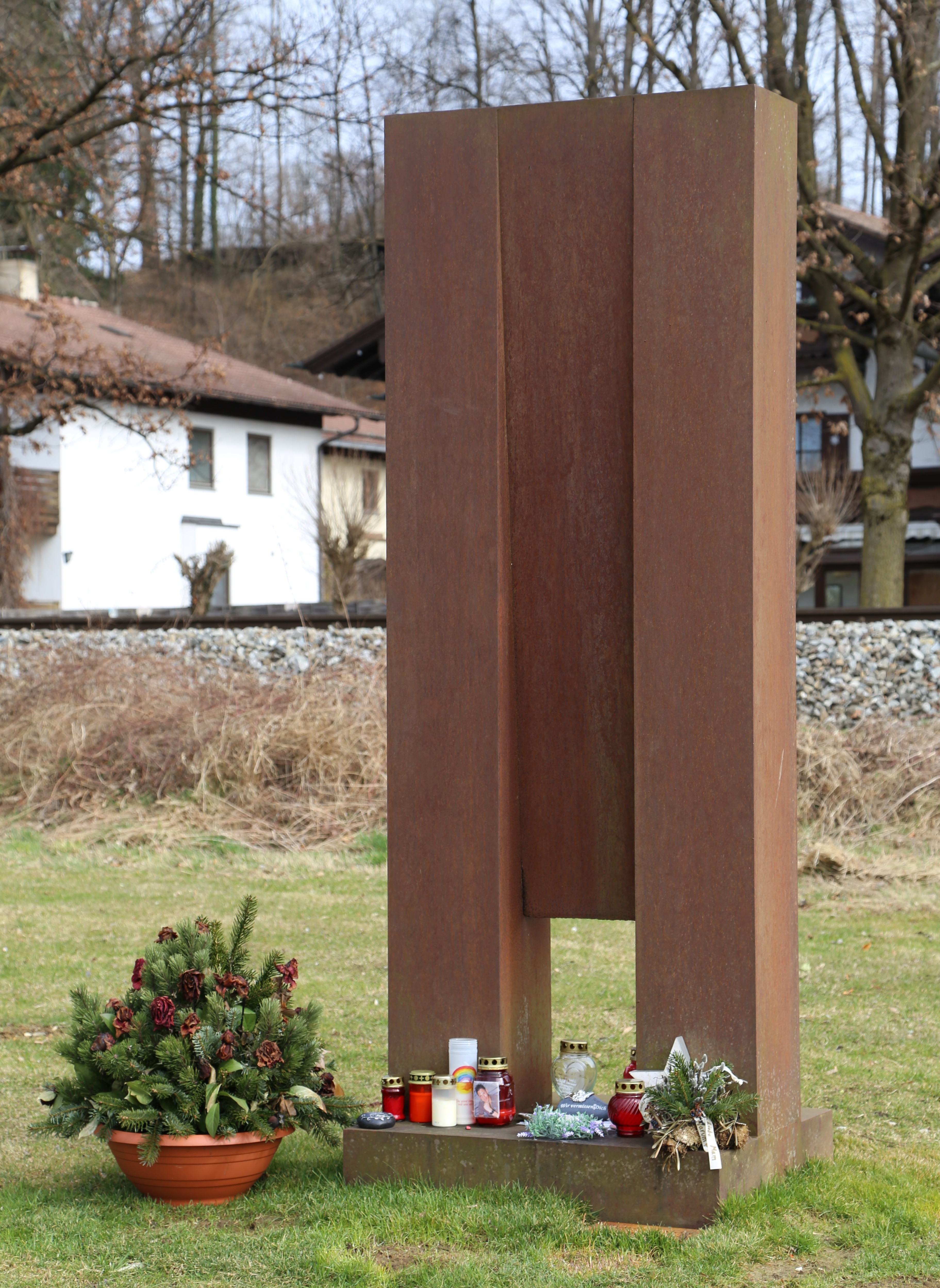 Denkmal zur Erinnerung an die Opfer des Eisenbahnunfalls von Bad Aibling am 9. Februar 2016; Bildhauer: Franz Ferdinand Wörle